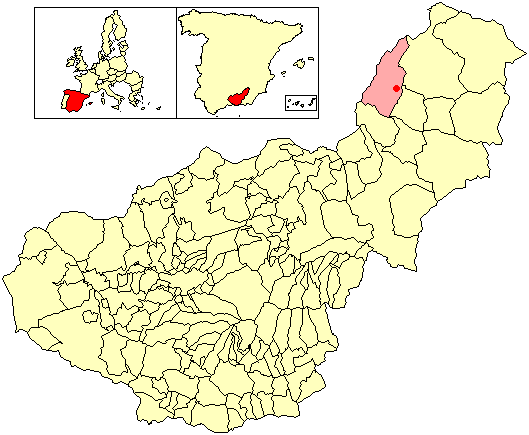 Situación de la localidad de Alamillo (en el municipio de Castril) respecto a la provincia de Granada, en España.